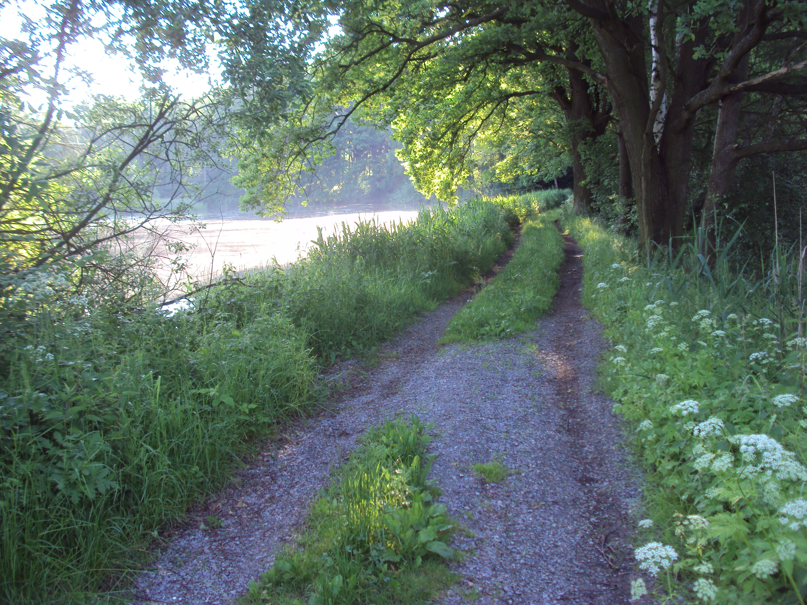 Česky: PP Manušické rybníky, cesta mezi nimi